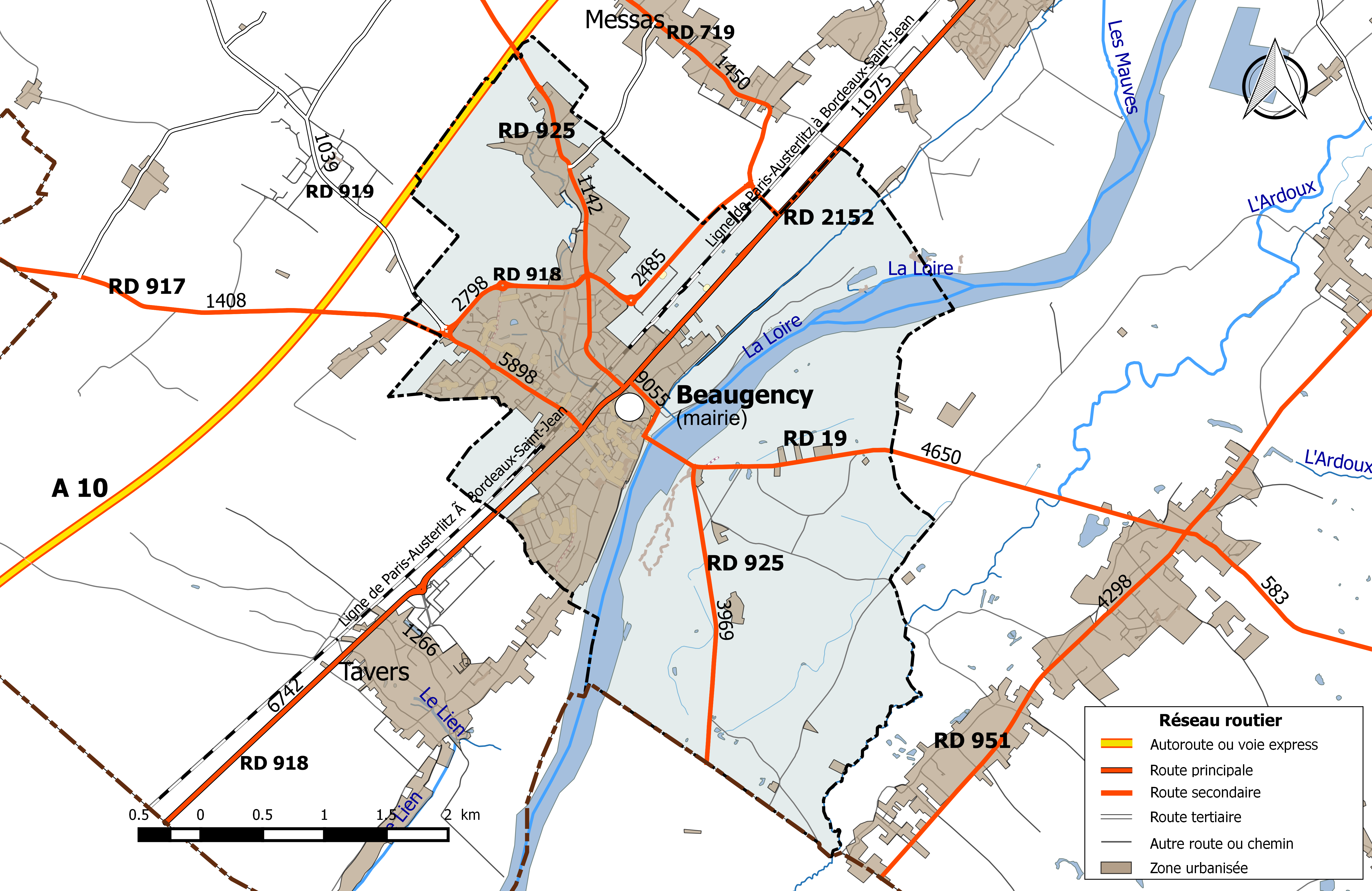 Carte du réseau routier de la commune de Beaugency.